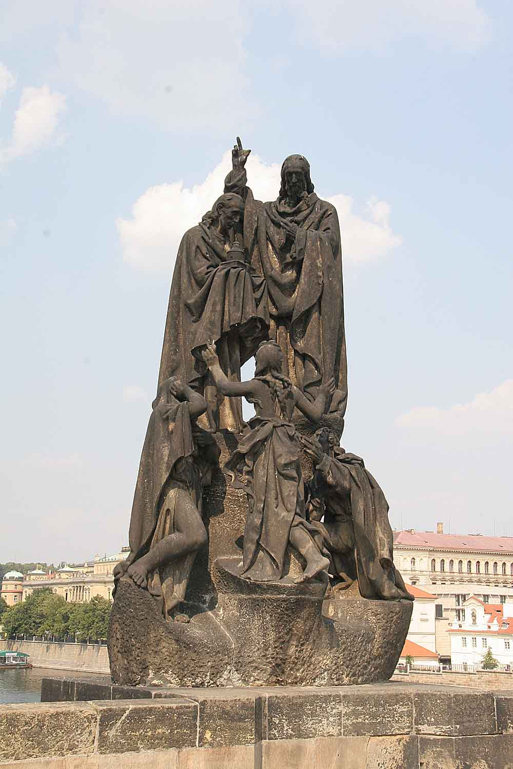 Sousoší Svatého Cyrila a Metoděje na Karlově mostě, 1929-1935, autor: Karel Dvořák (sochař) (1893-1950)